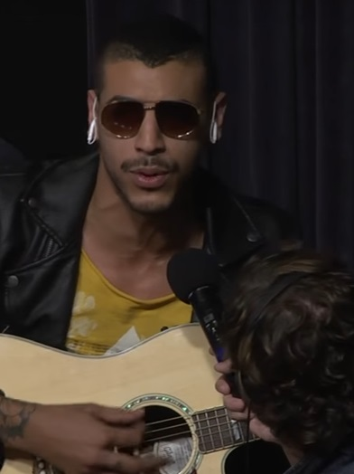 Como parte de la transmisión del noticiero de la FM desde el Politécnico Grancolombiano, Manuel Medrano llegó al Auditorio Jaime Michelsen, para ser entrevistado por Vicky Dávila y su equipo de periodistas.